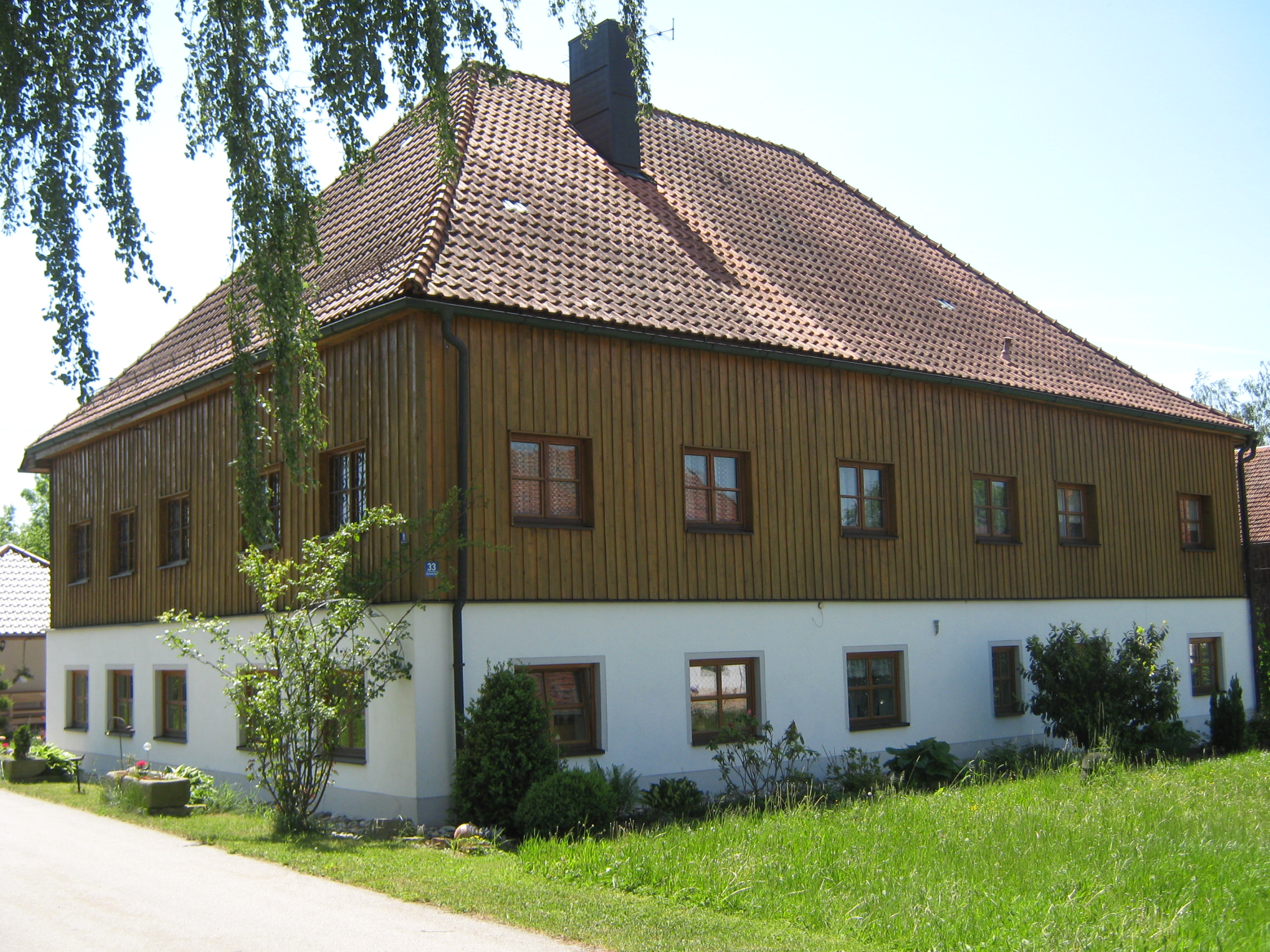 Das vor kurzem renovierte frühere Gesindehaus des abgegangenen Schlosses Haidenkofen bei Wallersdorf, Niederbayern, Deutschland